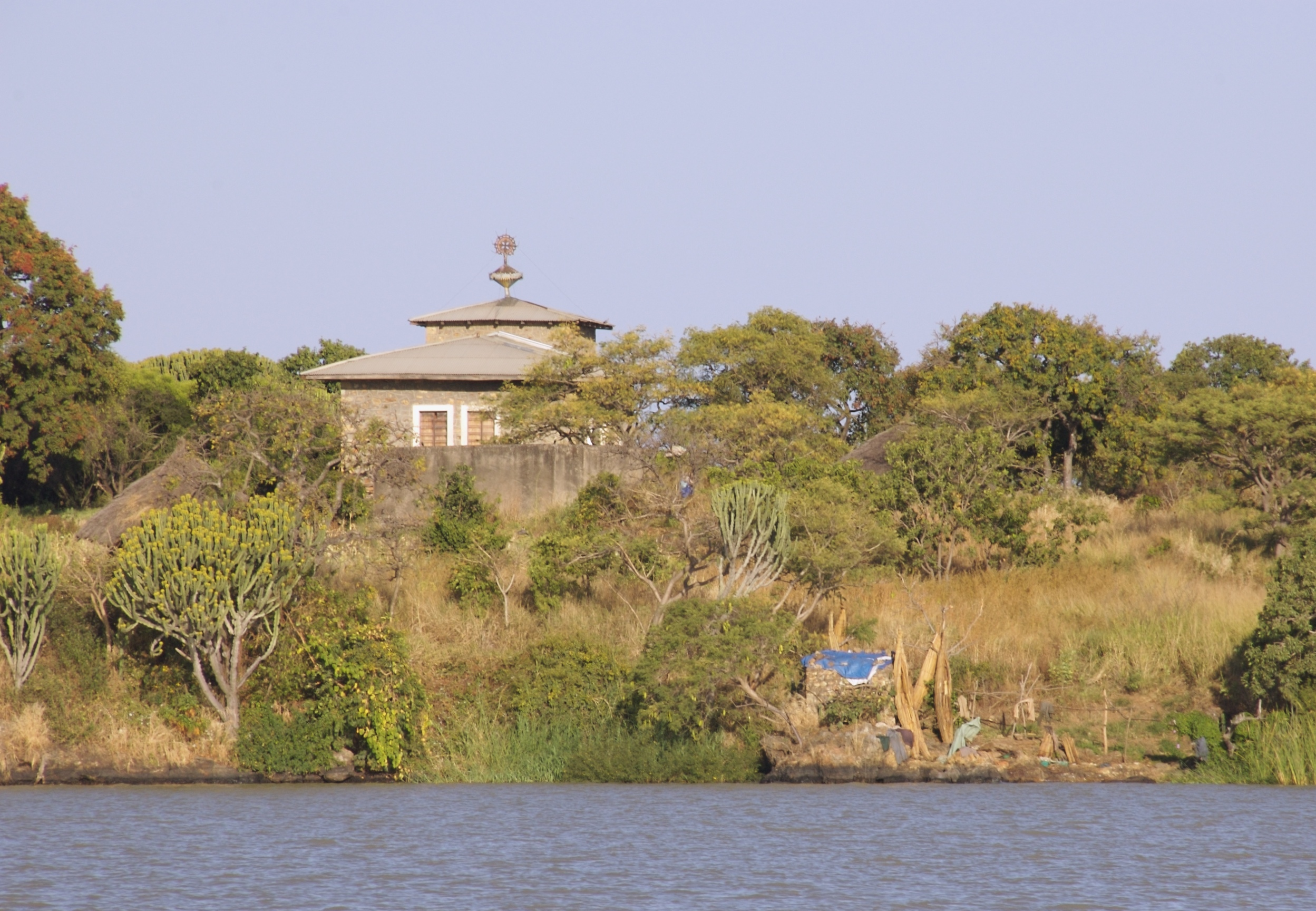 Lake Tana, Ethiopia.